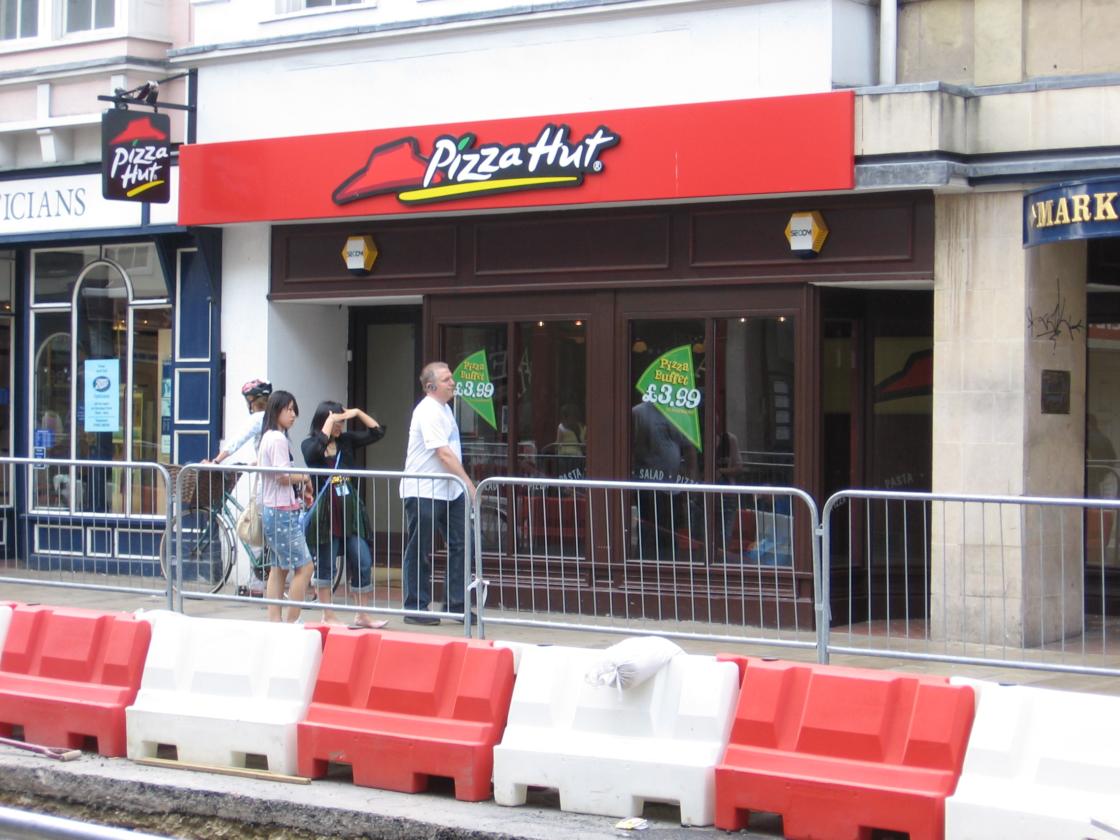 Restaurant du groupe Pizza Hut à Oxford au Royaume-Uni. Image prise le 4 août 2006 par shaunnol